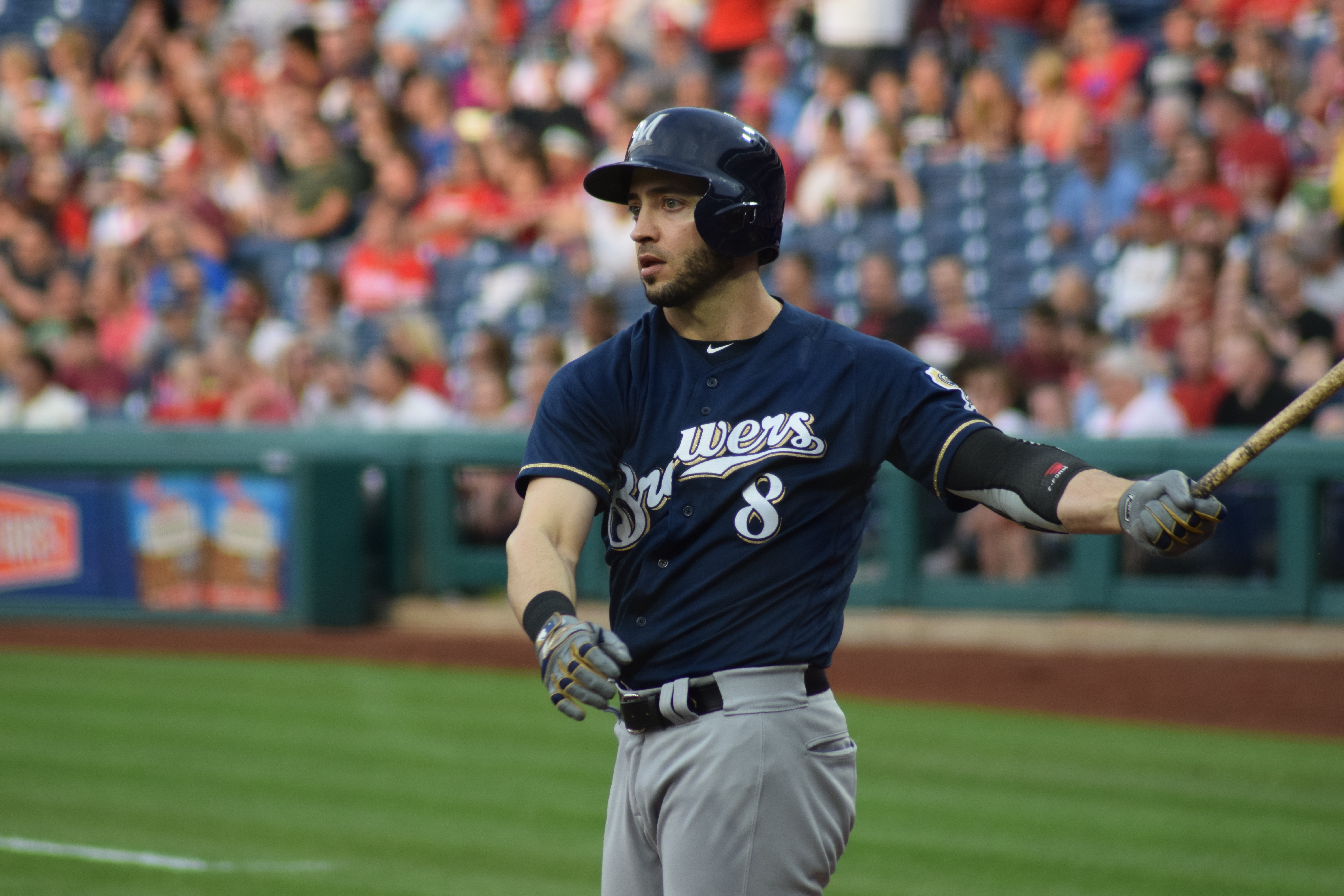 Ryan Braun